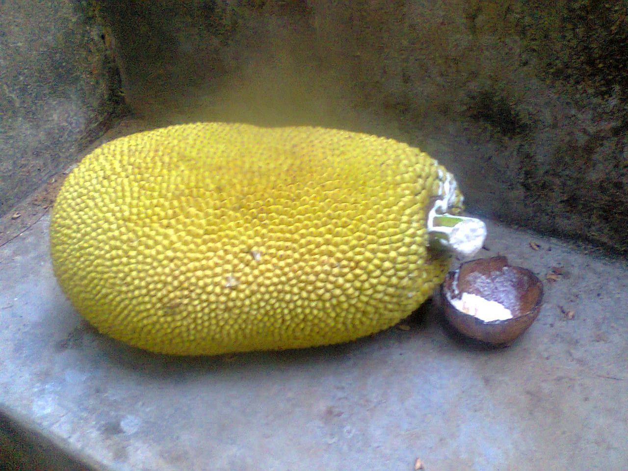 ചക്കക്കറ ശേഖരിക്കുന്നു 1